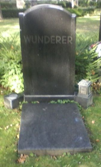 Anton Wunderer Grabstätte